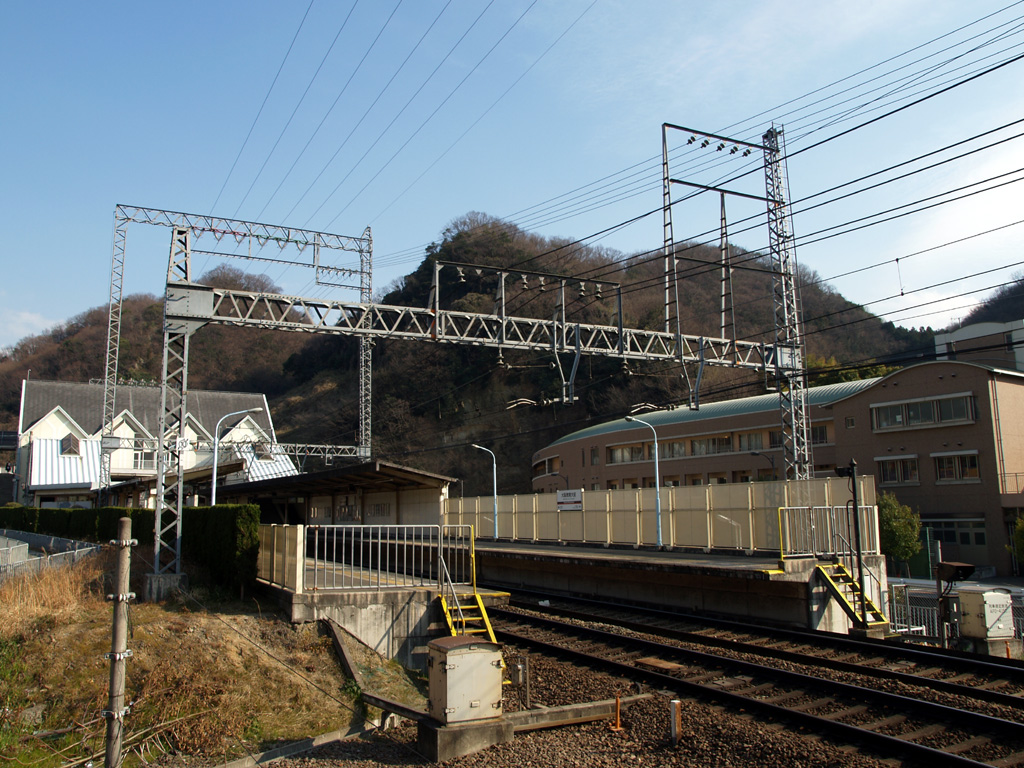 大阪教育大前駅